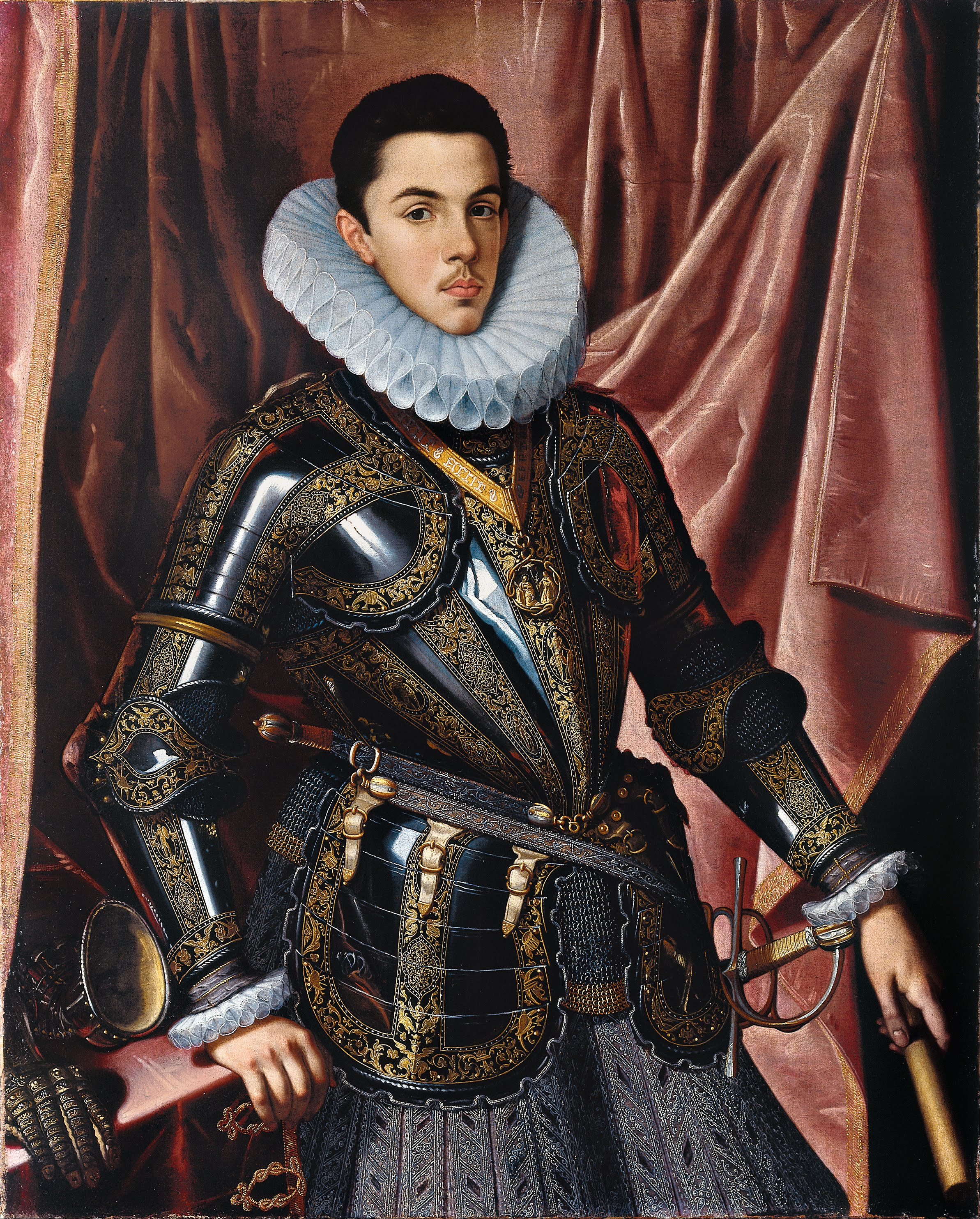 Retrato del príncipe Felipe Manuel de Saboya (1586-1605), que fue el hijo primogénito de Carlos Manuel I de Saboya, duque de Saboya, y de la infanta Catalina Micaela de Austria, hija del rey Felipe II de España.